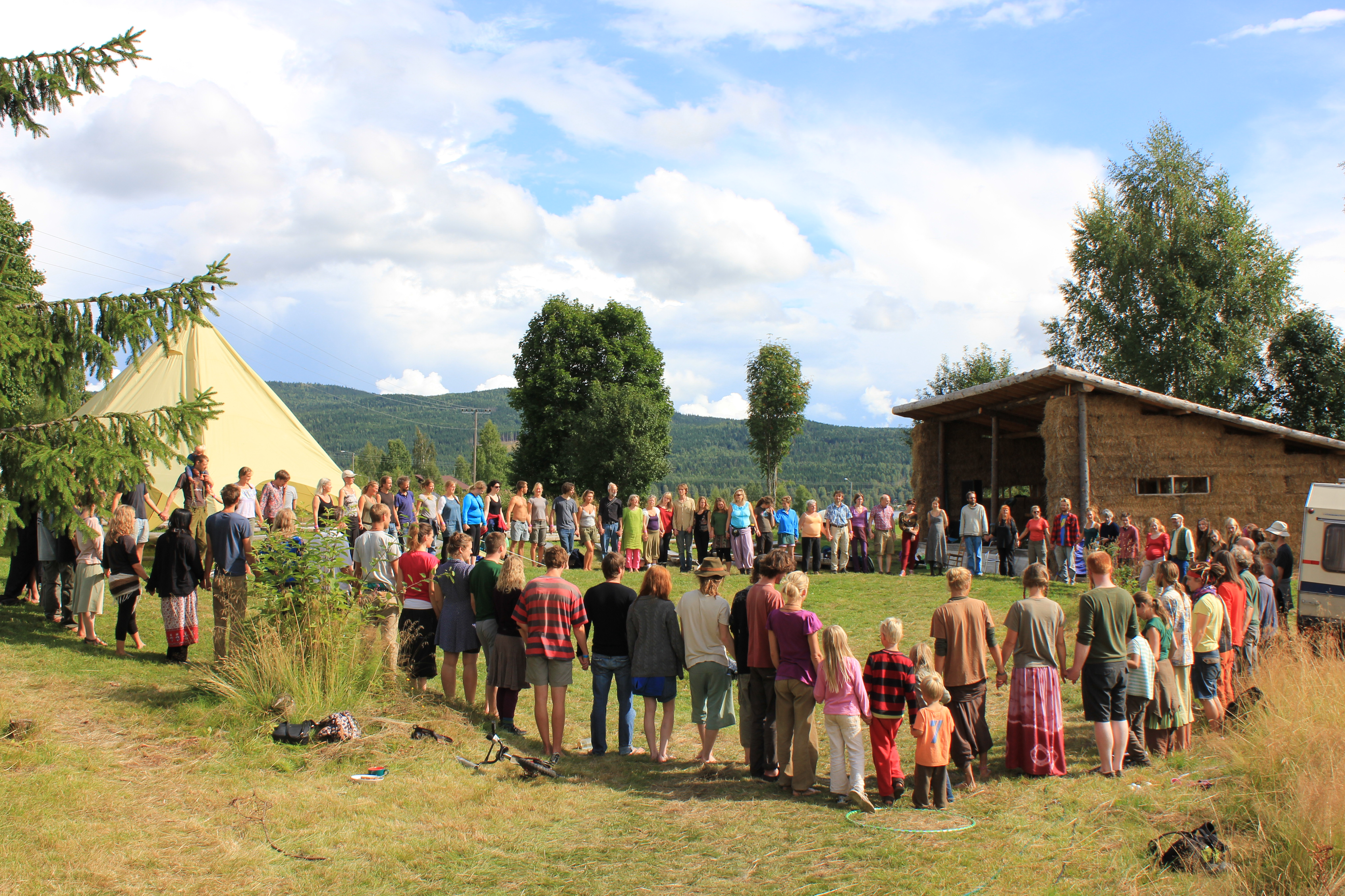 Fra Hurdal økolandsby og den skandinaviske permakulturfestivalen i 2013.